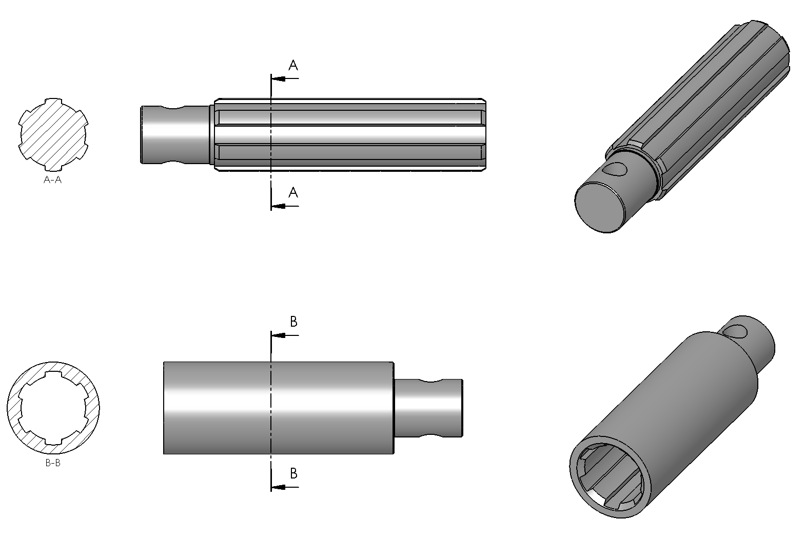 Beispiel für eine Keilwelle (oben) und entsprechender Nabe (unten) mit jeweils einem Schnitt durch das Profil und einer 3D-Ansicht. Die Welle und die Nabe sind abgesetzt und mit einer Querbohrung versehen.